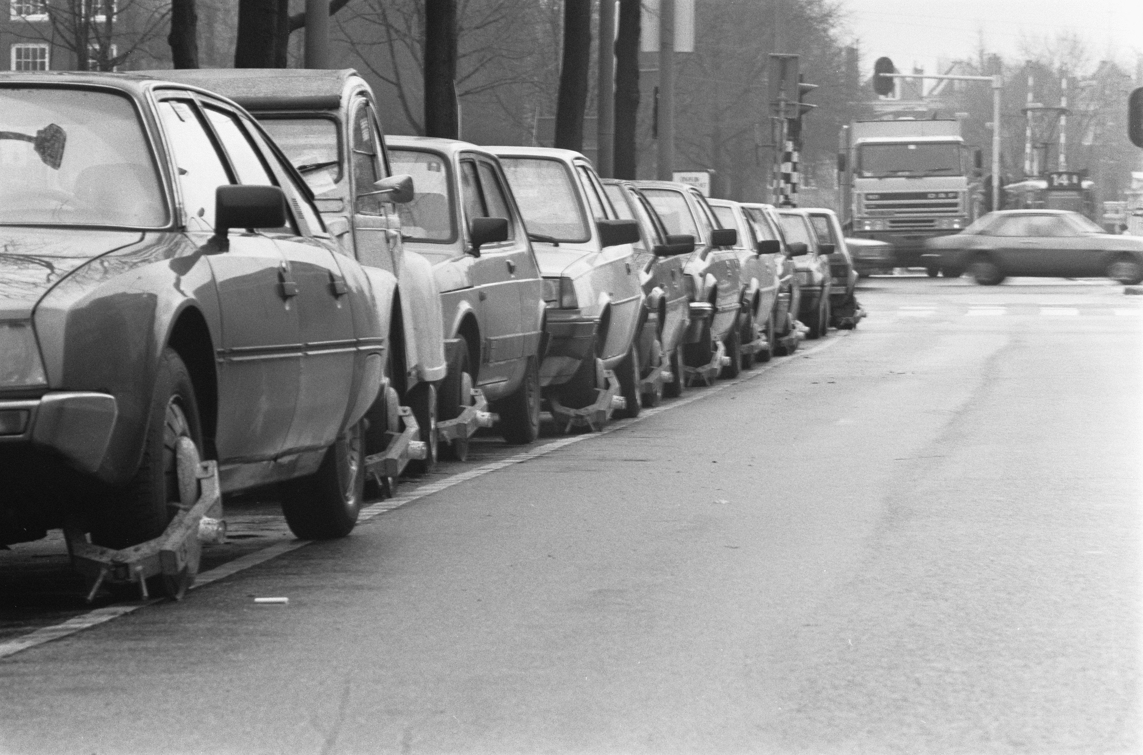 Collectie / Archief : Fotocollectie Anefo Reportage / Serie : [ onbekend ] Beschrijving : Rij geparkeerde autos met de wielklem in Jodenbreestraat in Amsterdam Datum : 26 januari 1988 Locatie : Amsterdam, Noord-Holland Trefwoorden : Wielklemmen, auto's Fotograaf : Croes, Rob C. / Anefo Auteursrechthebbende : Nationaal Archief Materiaalsoort : Negatief (zwart/wit) Nummer archiefinventaris : bekijk toegang 2.24.01.05 Bestanddeelnummer : 934-1771